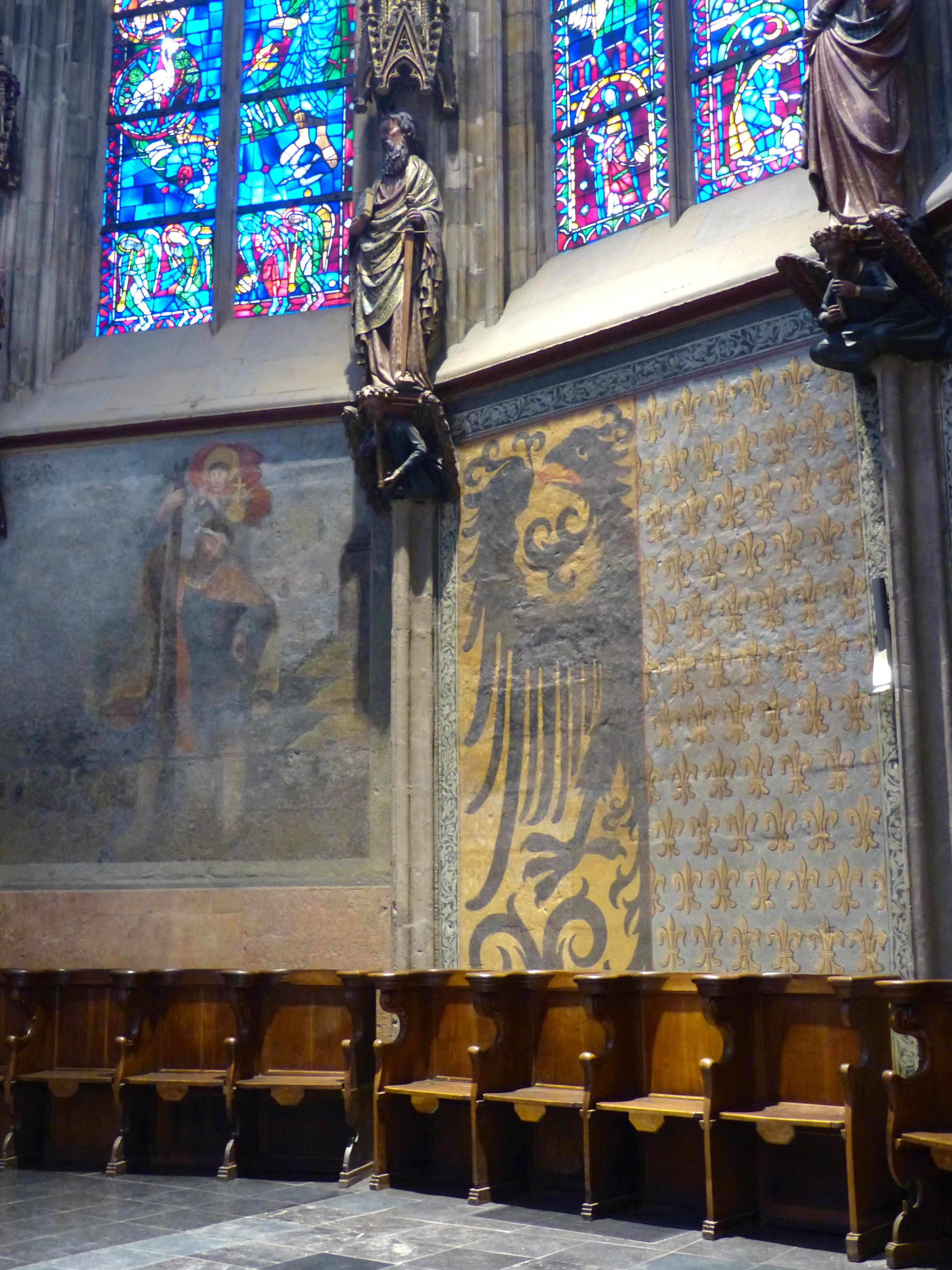 Aachener Dom: Wandmalerei in der gotischen Chorhalle